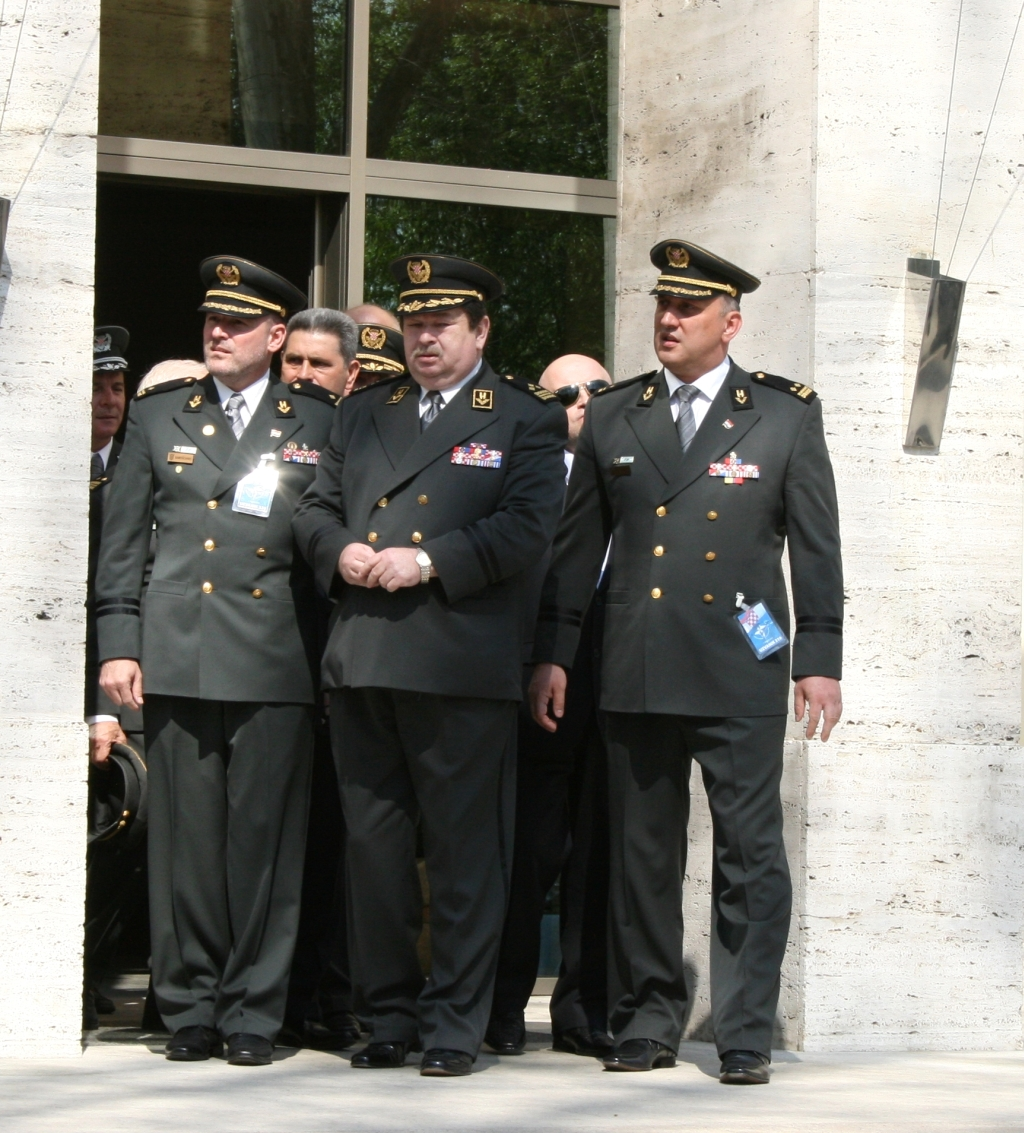 Svečanost podizanja NATO-ve zastave ispred zgrade MORH-a u Zagrebu. Na slici: Đuro Dečak (u sredini).